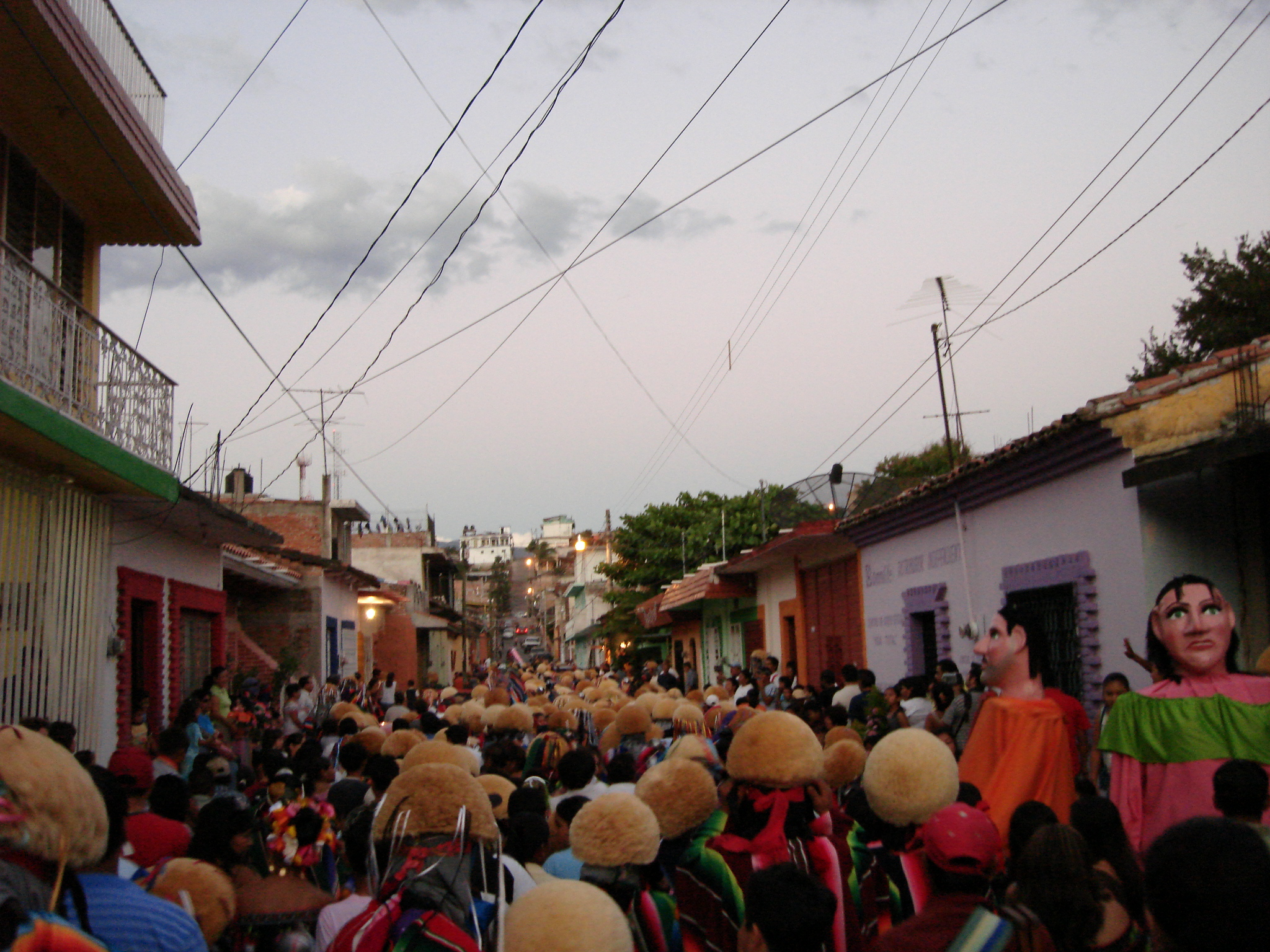 Chiapa de CorzoDSC04173.JPG